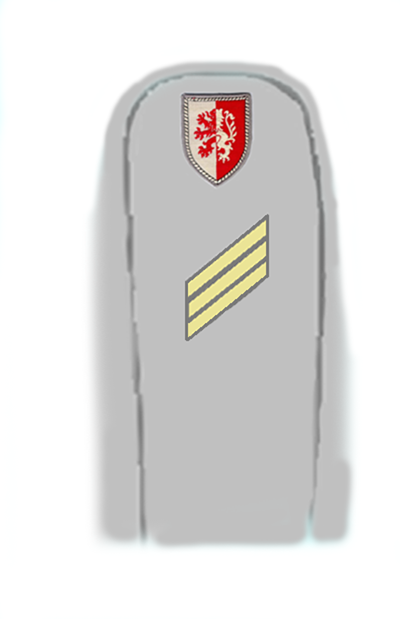 Dienstgradabzeichen alter Art am Ausgehanzug für einen Hauptgefreiten der Divisionstruppen 2. Panzergrenadierdivision